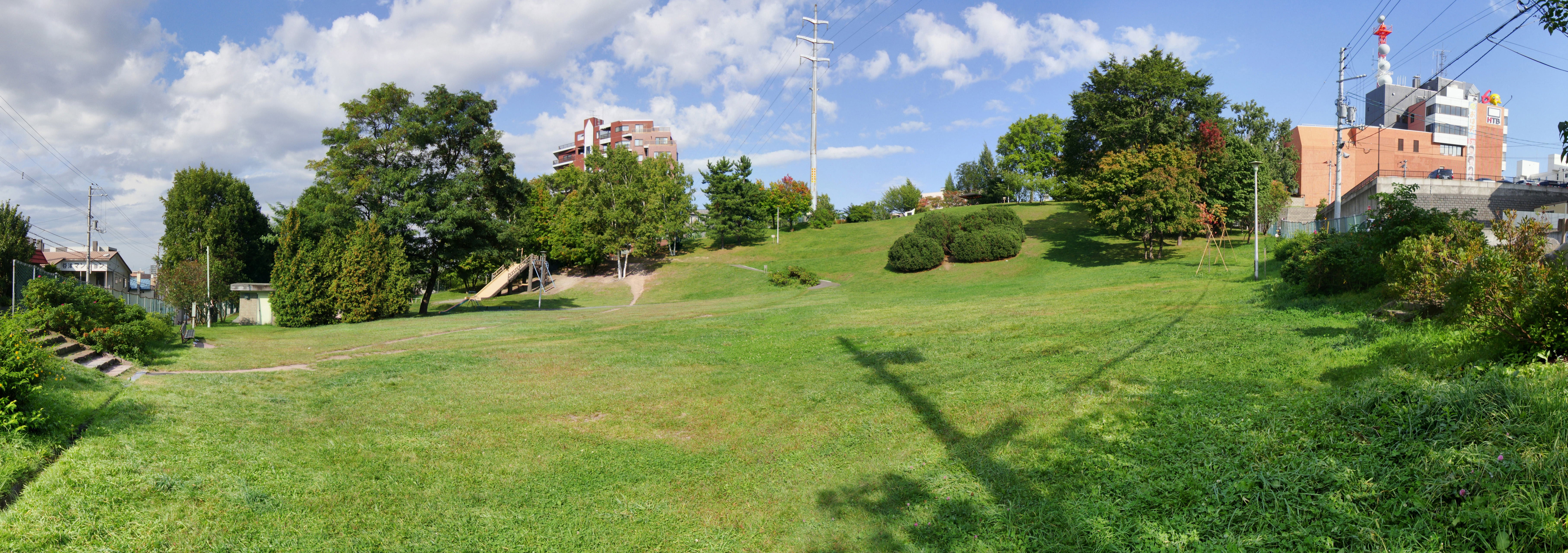 2009年9月18日に投稿者自身にてDSC-W300で撮影。Adobe Phoroshop CS4にて合成。